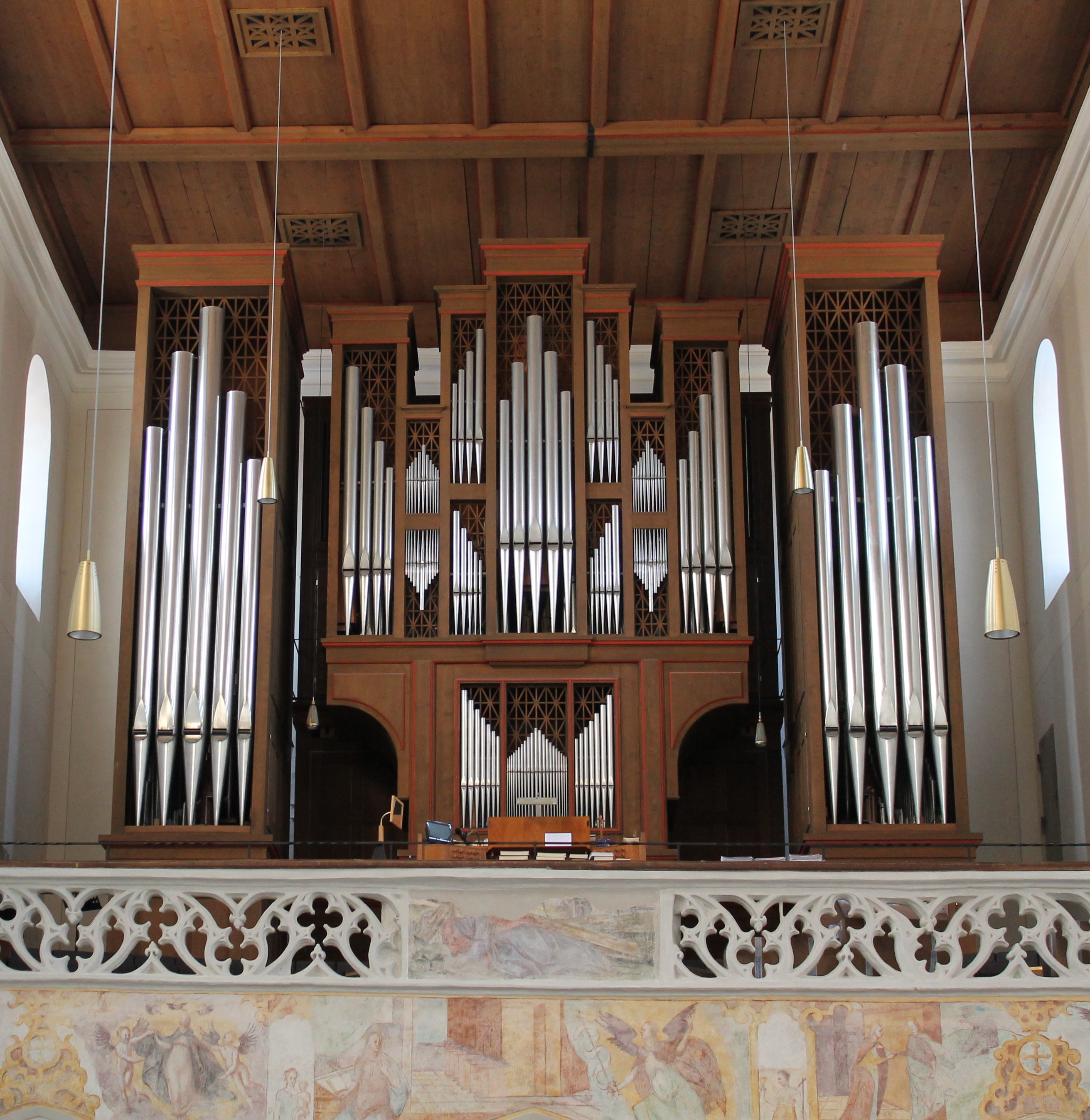 Die Orgel vom St.-Kastulus-Münster in Moosburg (Guido Nenninger von 1974 mit III/39)